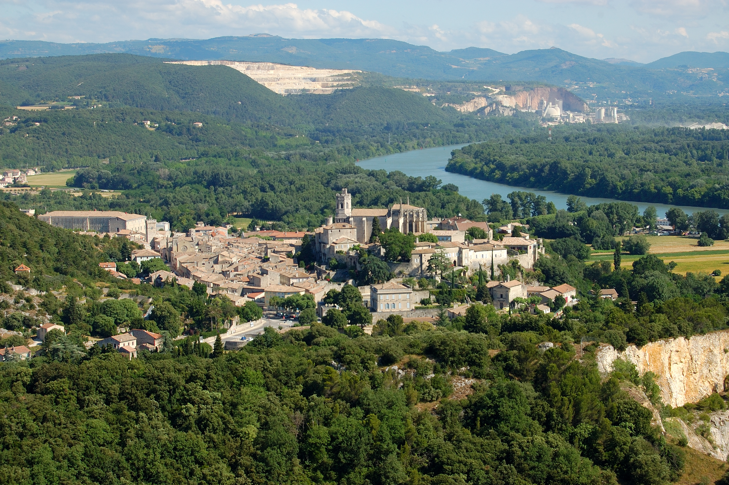 Viviers, vu de la montagne St Michel